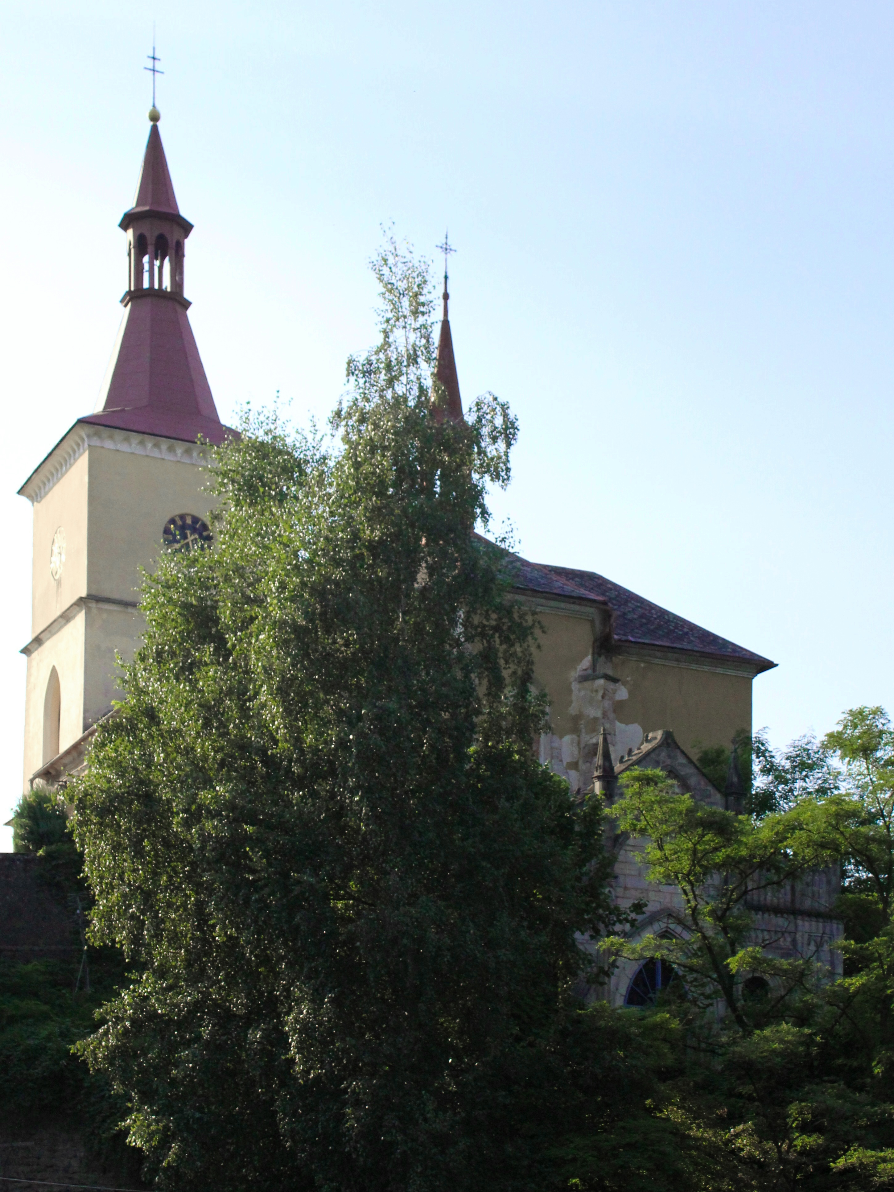 Kostel Nejsvětější Trojice s hrobkou rodu Rohanů, Loukov